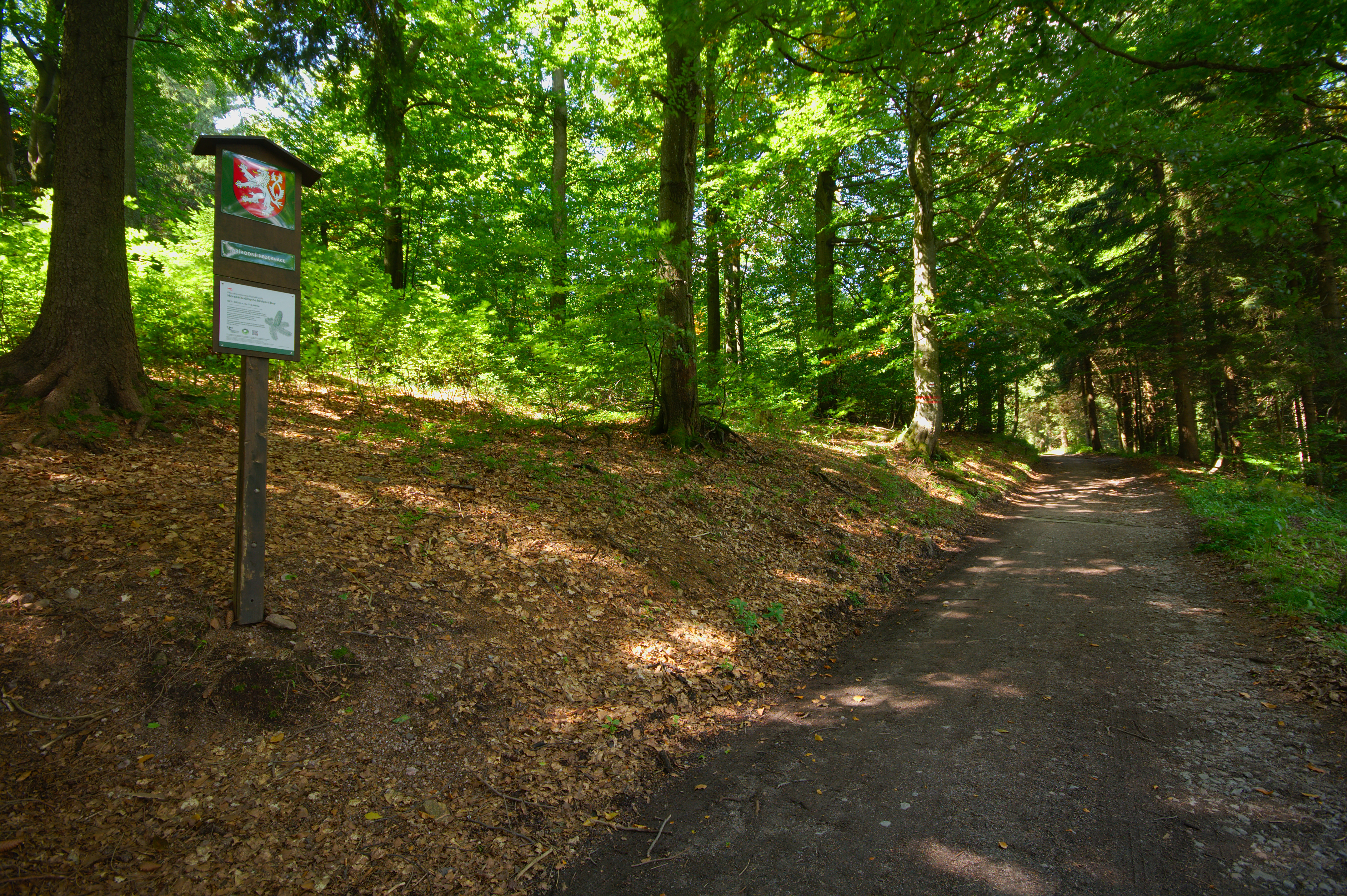 Přírodní rezervace Komáří vrch, okres Rychnov nad Kněžnou